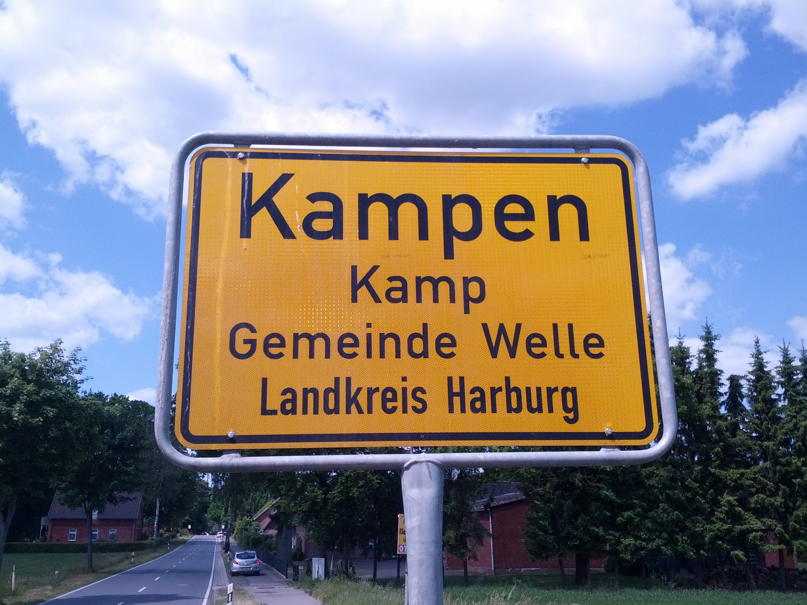 Oortsschild von Kamp, Landkreis Horborg, mit den Naam op Hoochdüütsch un op Plattdüütsch